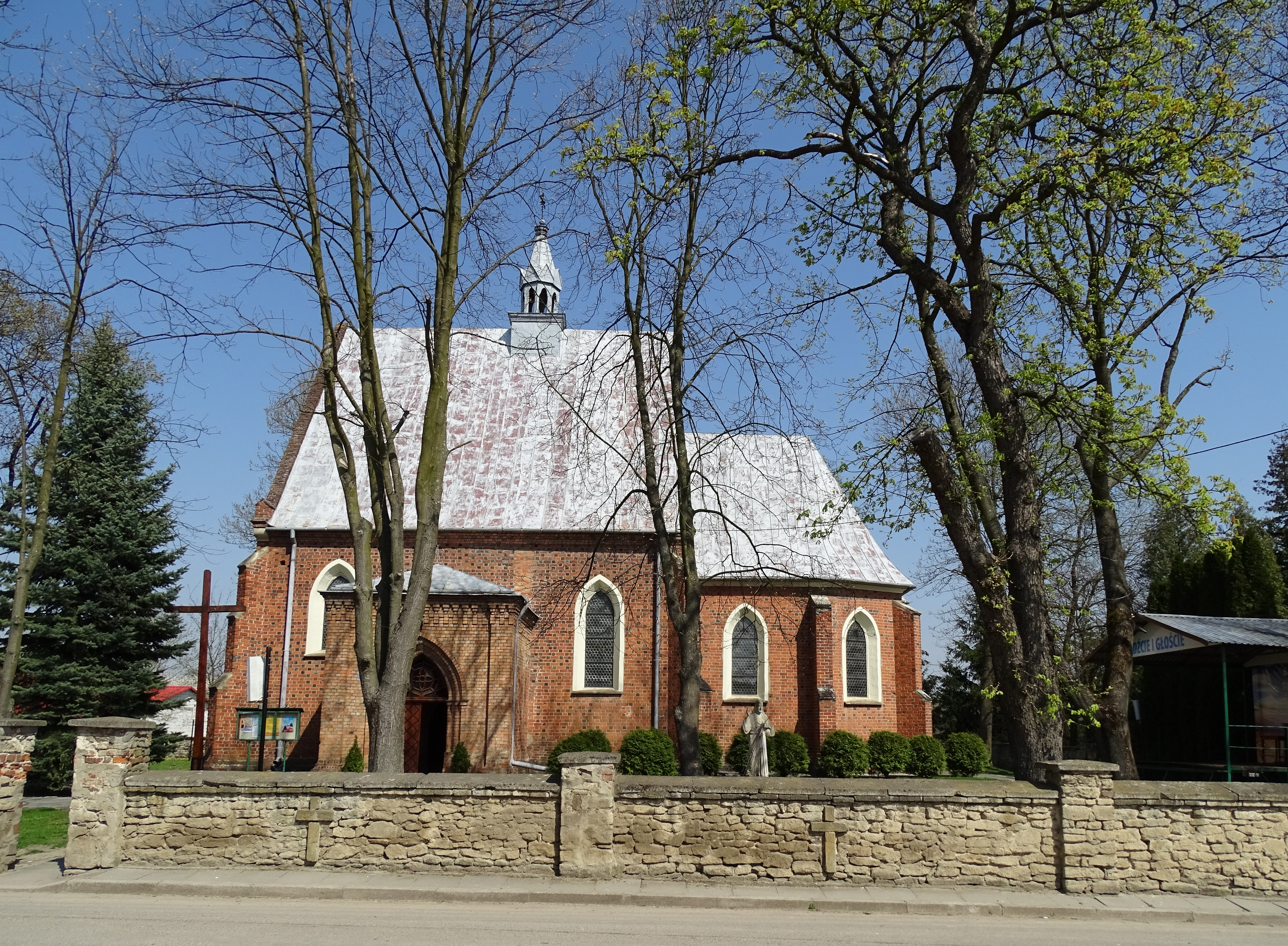 Skotniki, Powiat Sandomierski, kościół p.w. Jana Chrzciciela. XIV wiek.